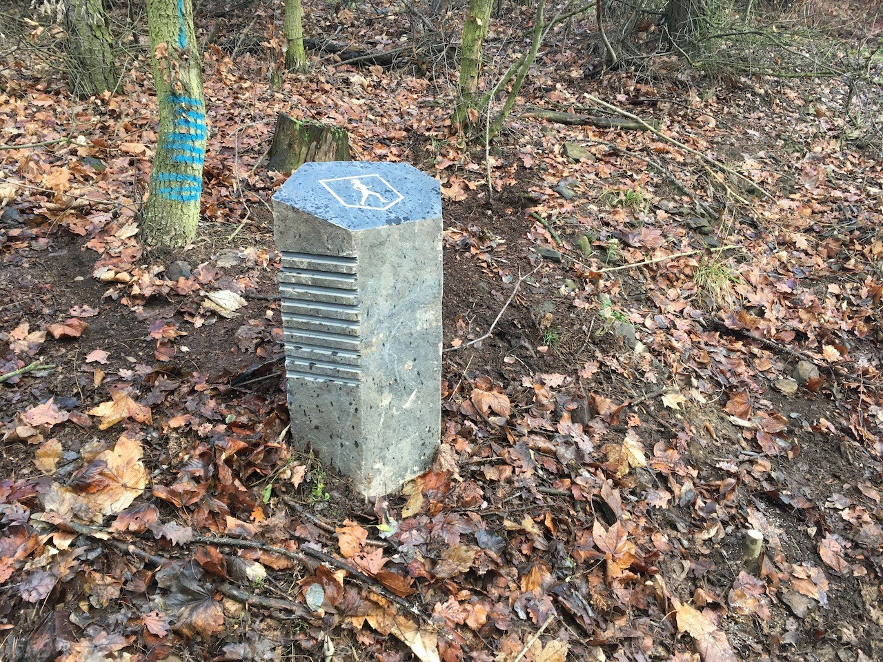 fotografie kilometrovníku na stezce GreenRunner na kopci Resll.